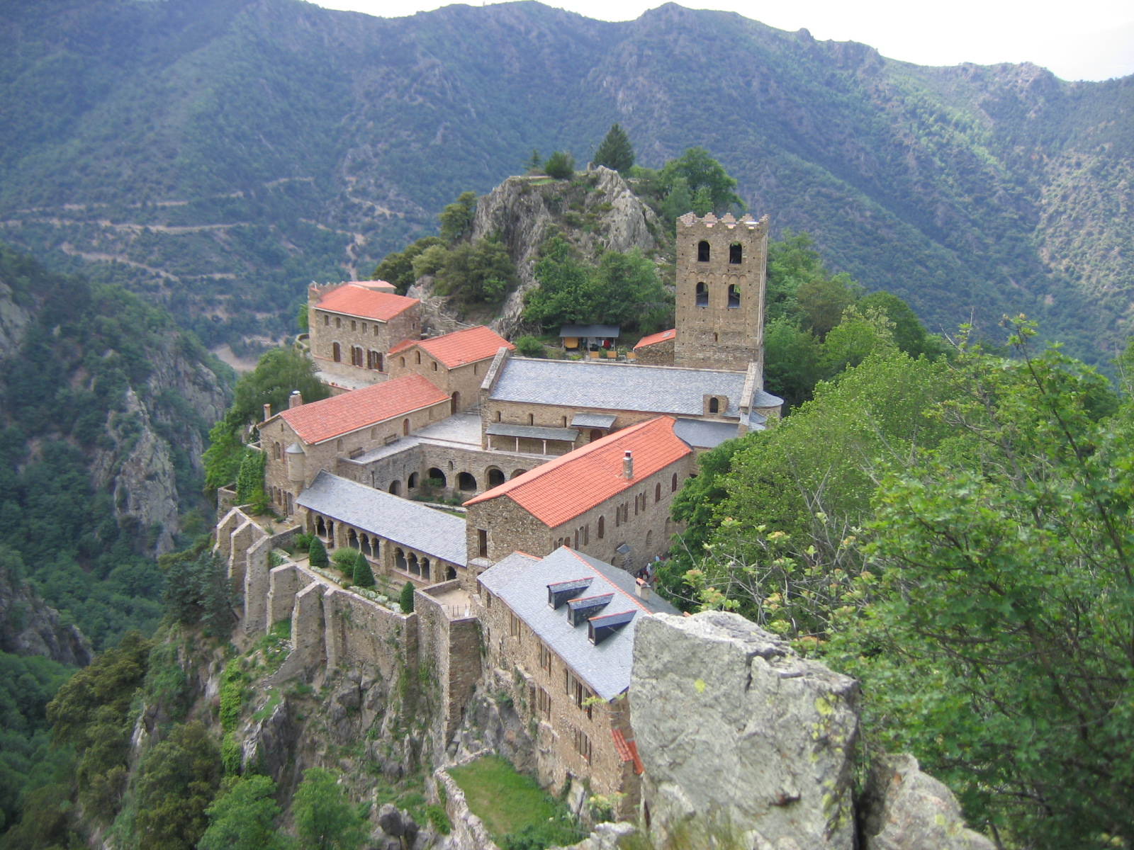 Kloster St-Martin-du-Canigou, Dépt. Pyrénées Orientales, Frankreich